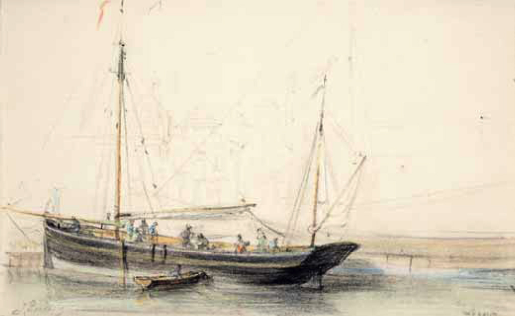 Logger aan de kade door Jan Ensing